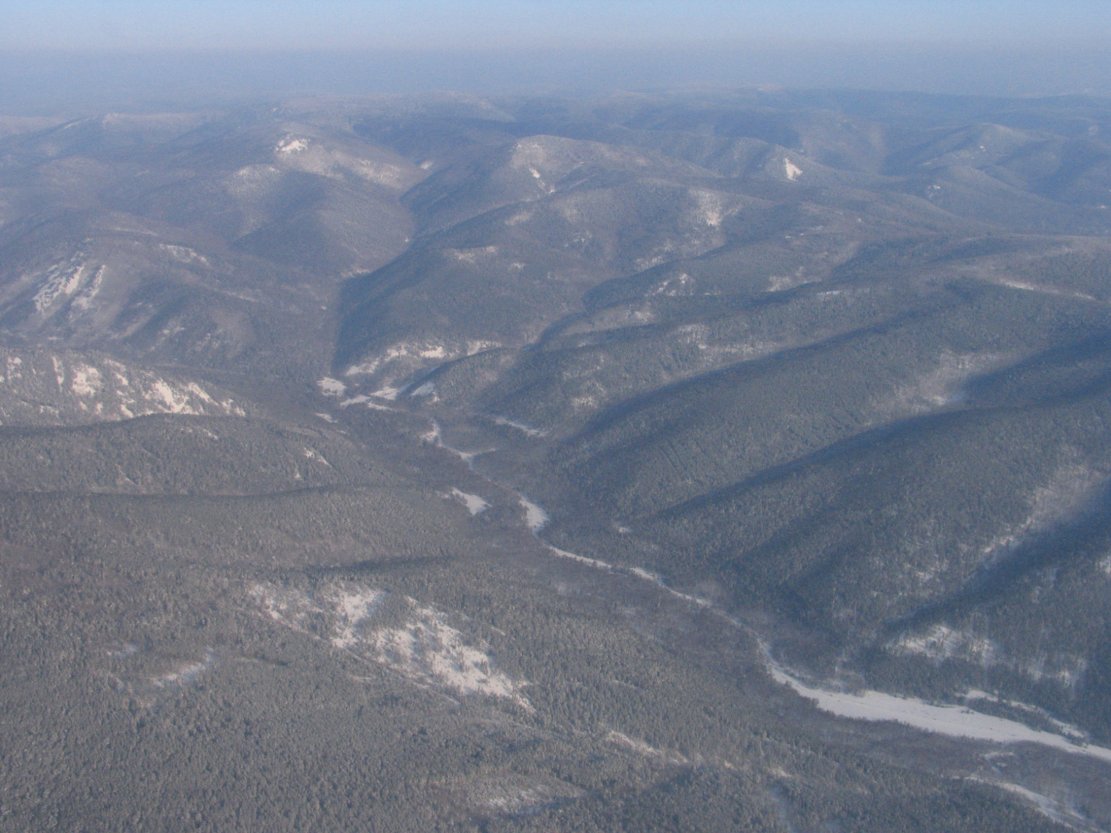 Южные склоны Хамар-Дабана (около Улан-Удэ)